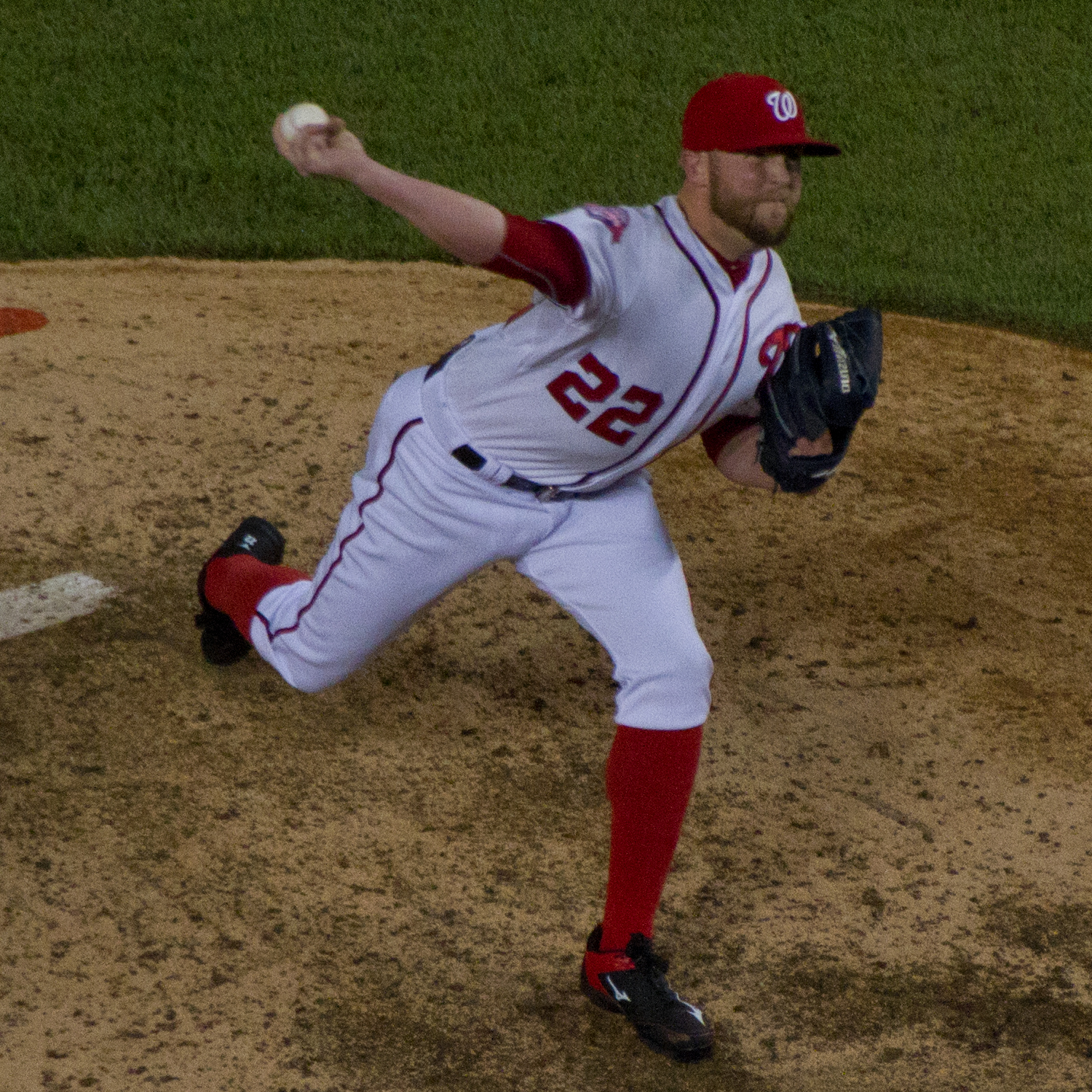 Drew Storen